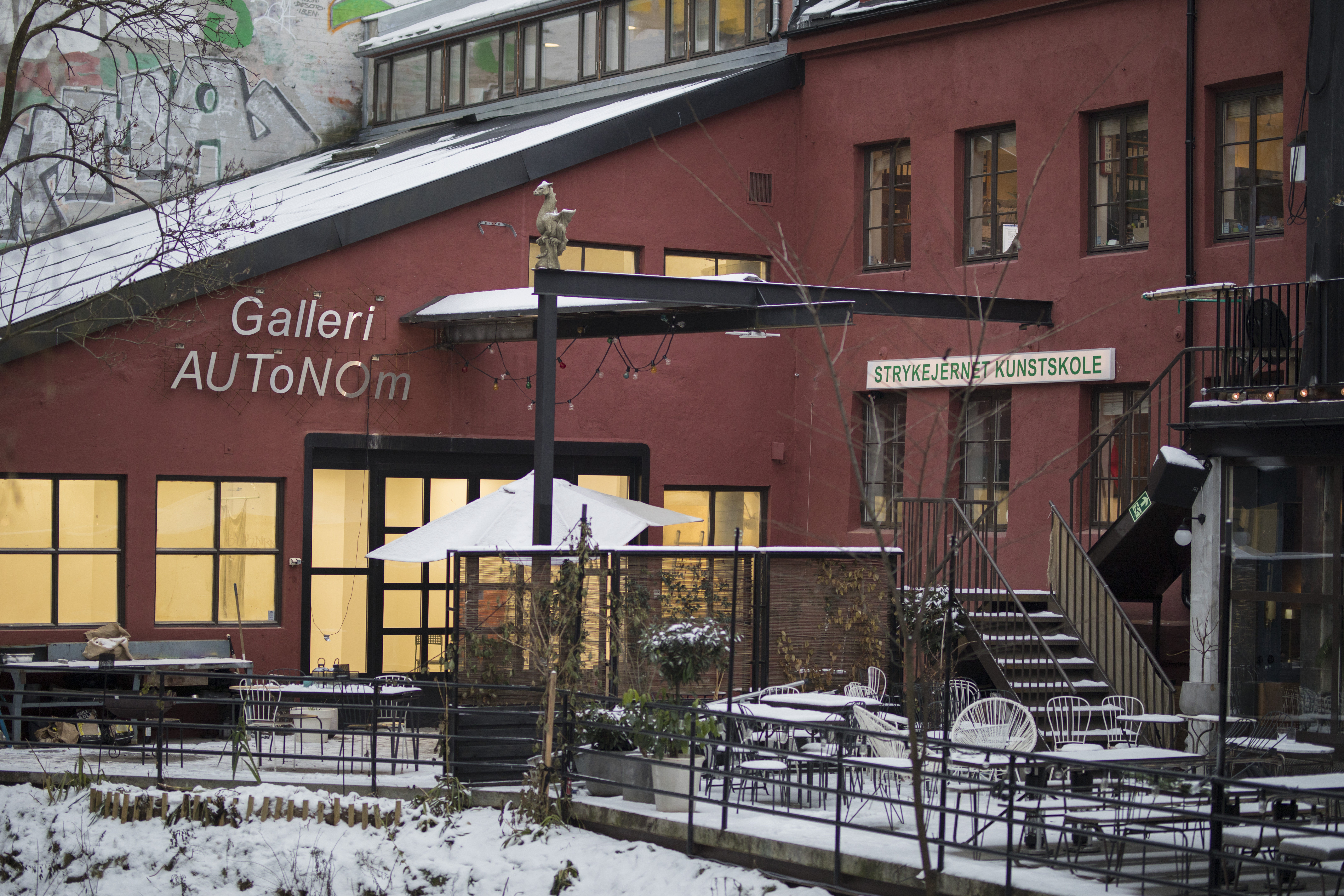 Strykejernet Kunstskole i Oslo